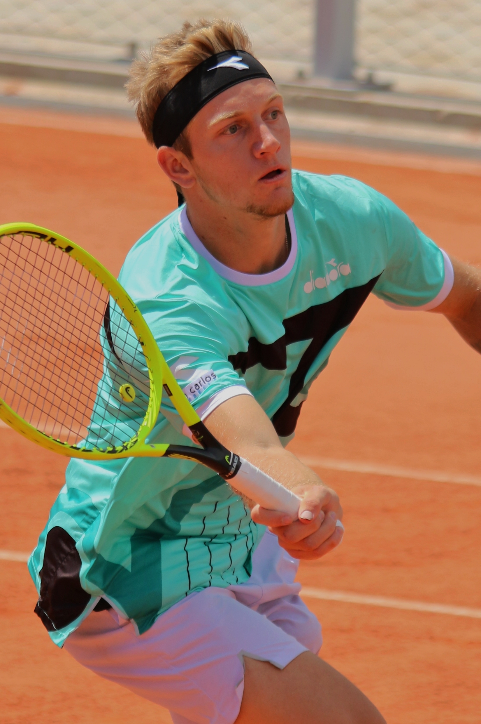 Davidovich Fokina RG19 (9)